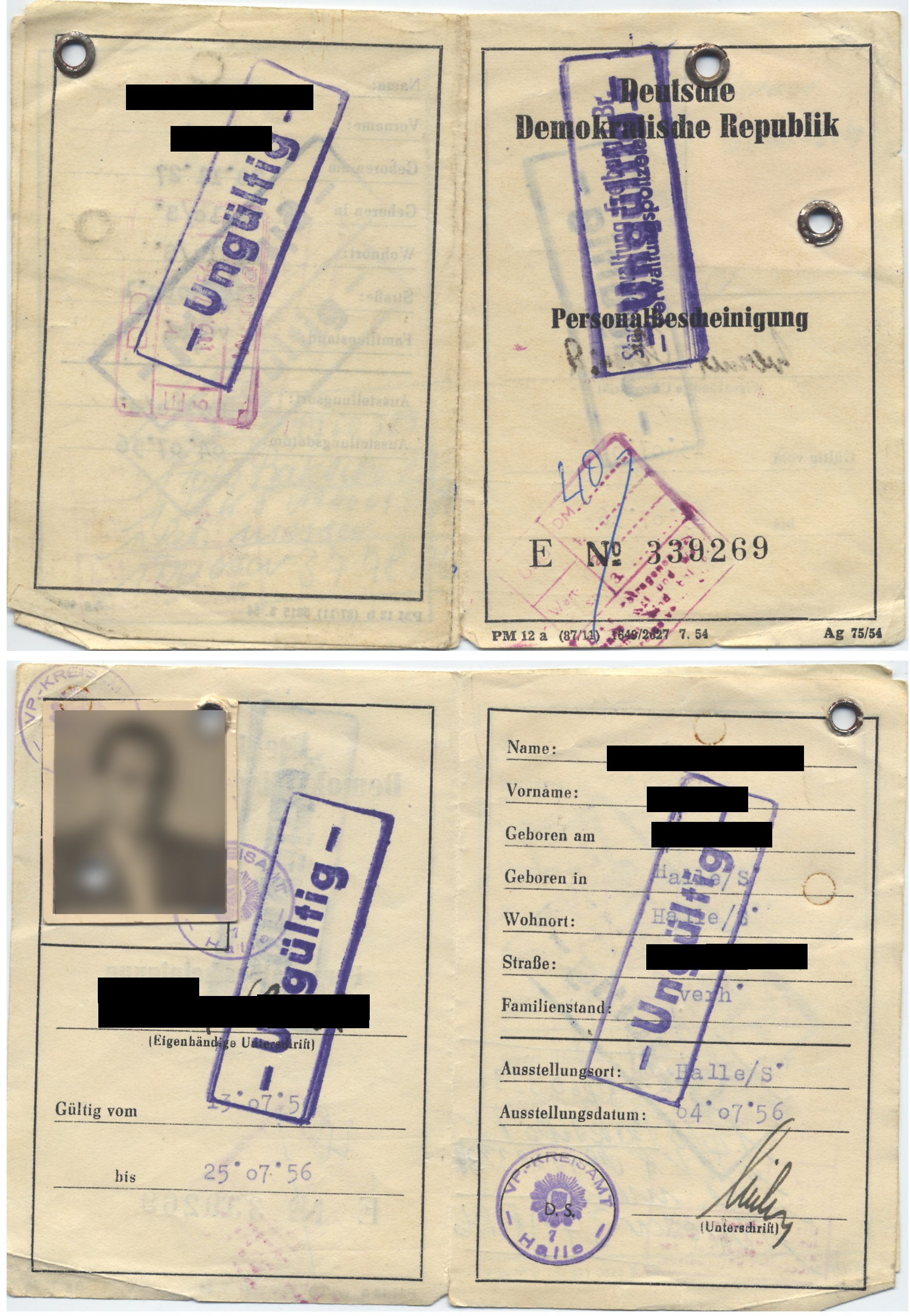 Personalbescheinigung